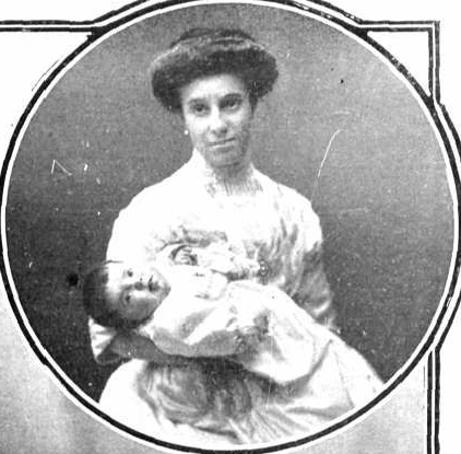 Retrato de la infanta María Teresa de Borbón y Habsburgo-Lorena con su hija María Mercedes publicado en enero de 1912